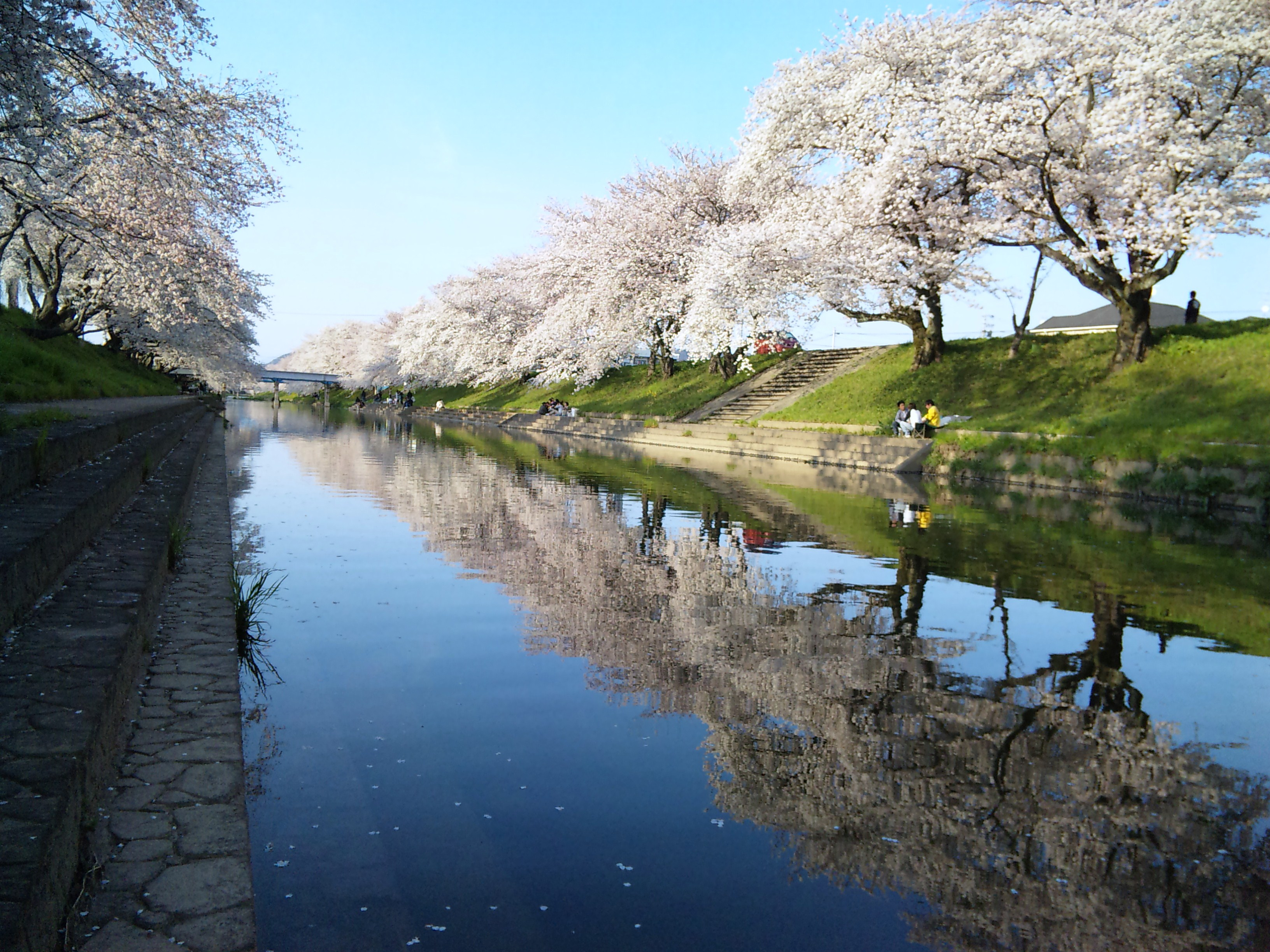 新境川に咲く桜